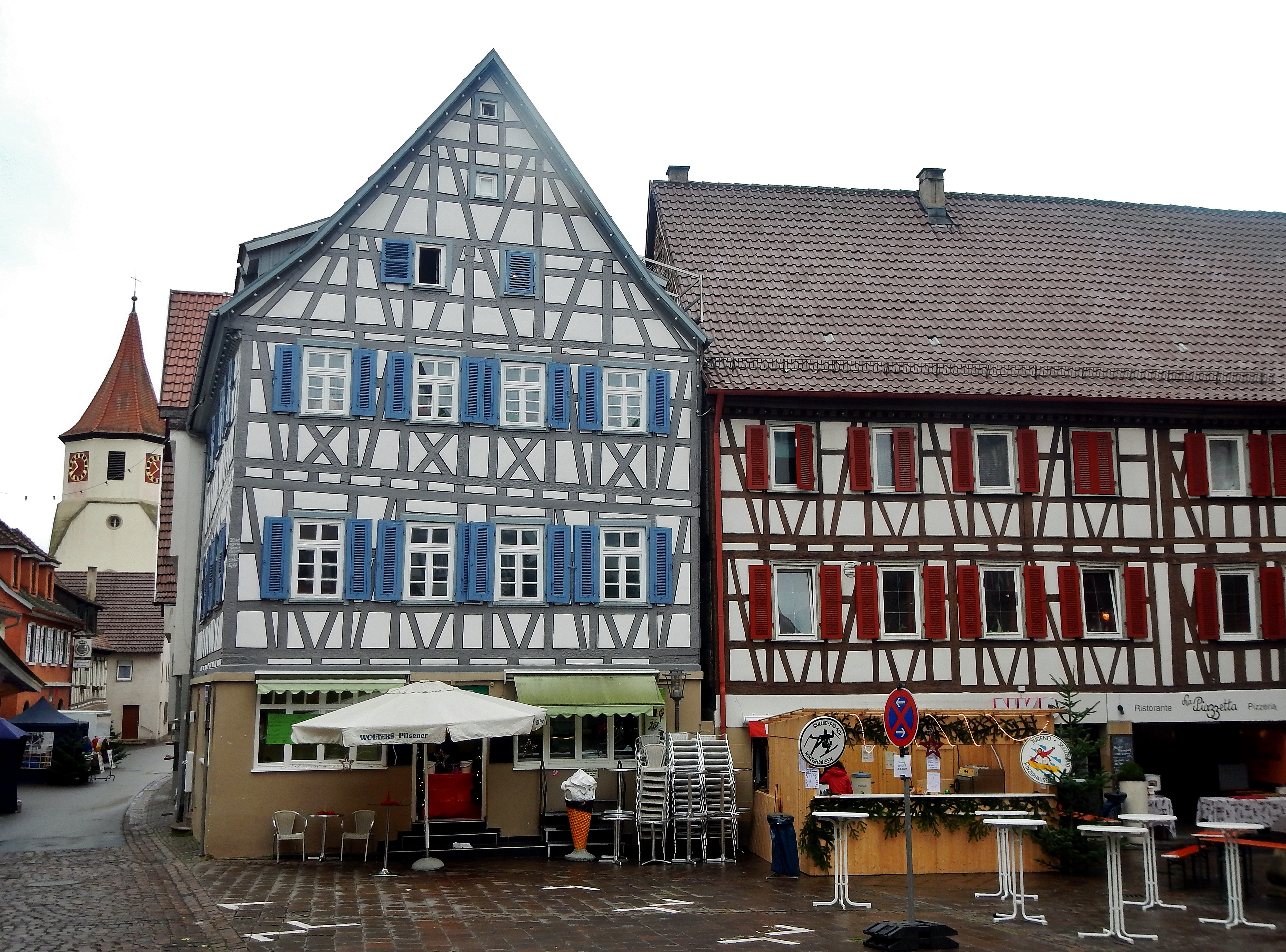 Marktplatz in Großbottwar